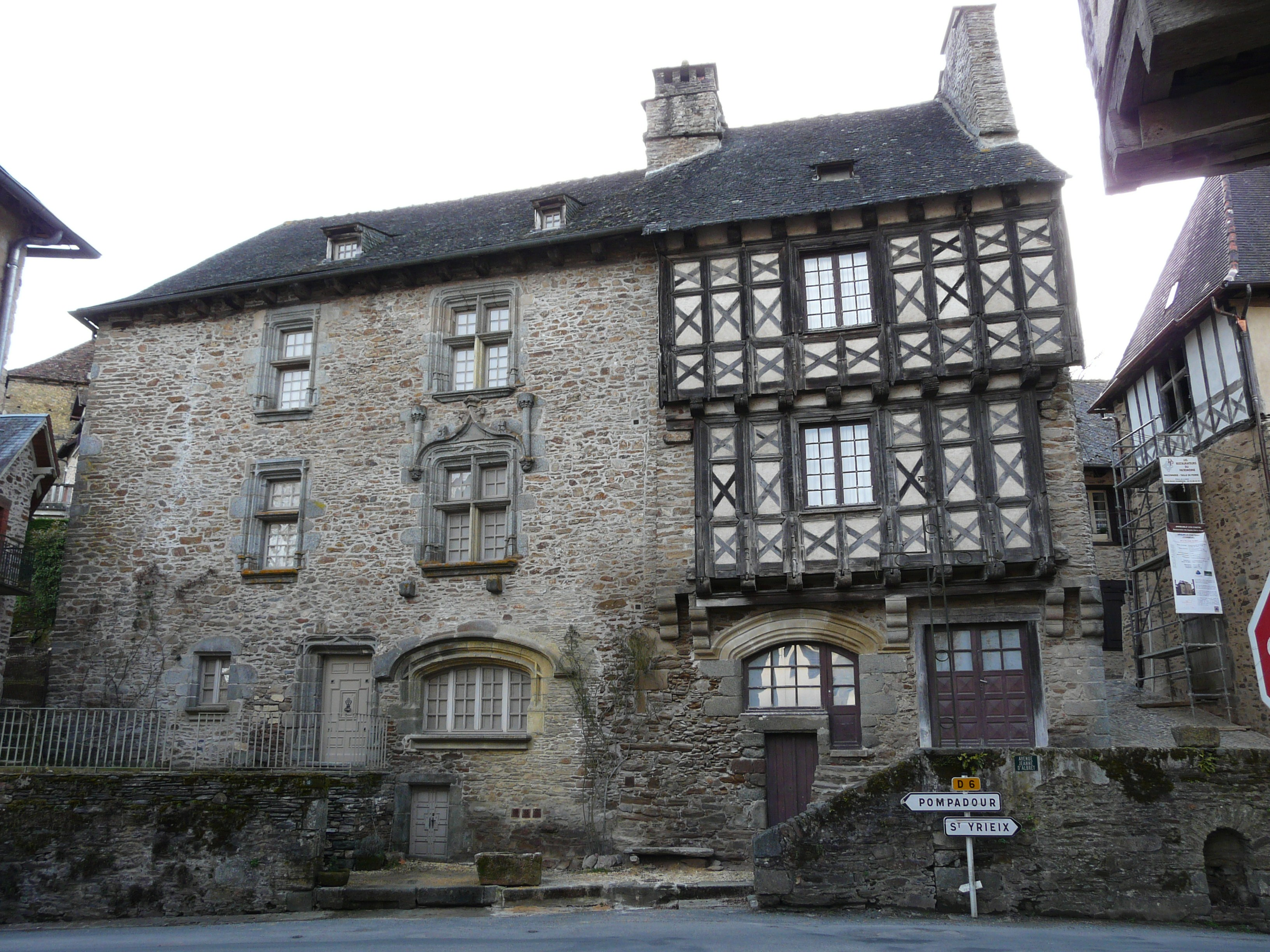 La maison Henri IV (à gauche) et la maison Boyer (à droite) du XVe siècle, Ségur-le-Château, Corrèze, France Object location45° 25′ 44.4″ N, 1° 18′ 13.75″ E